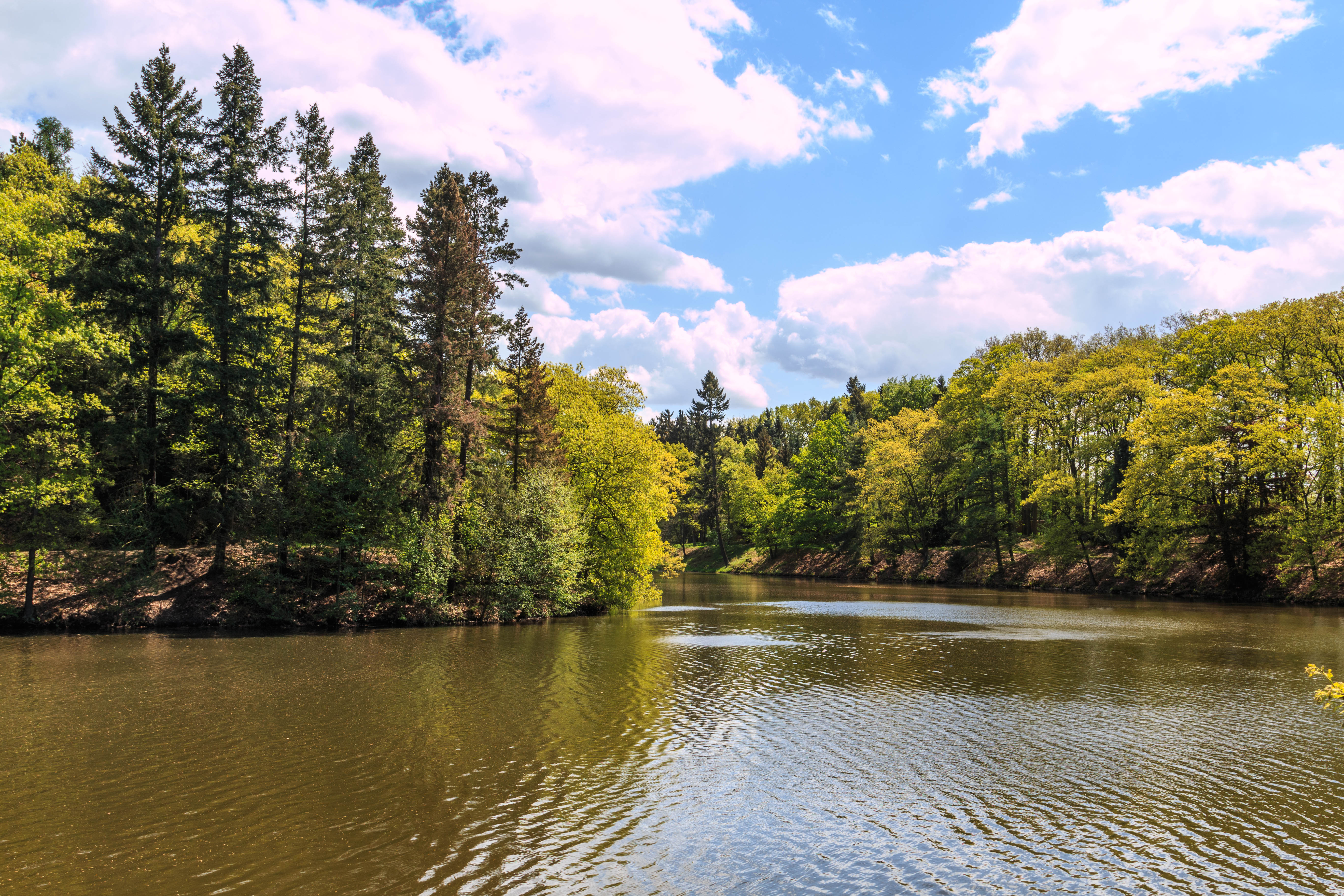 Průhonická obora - rybník Bořín Project: Chráněná území.